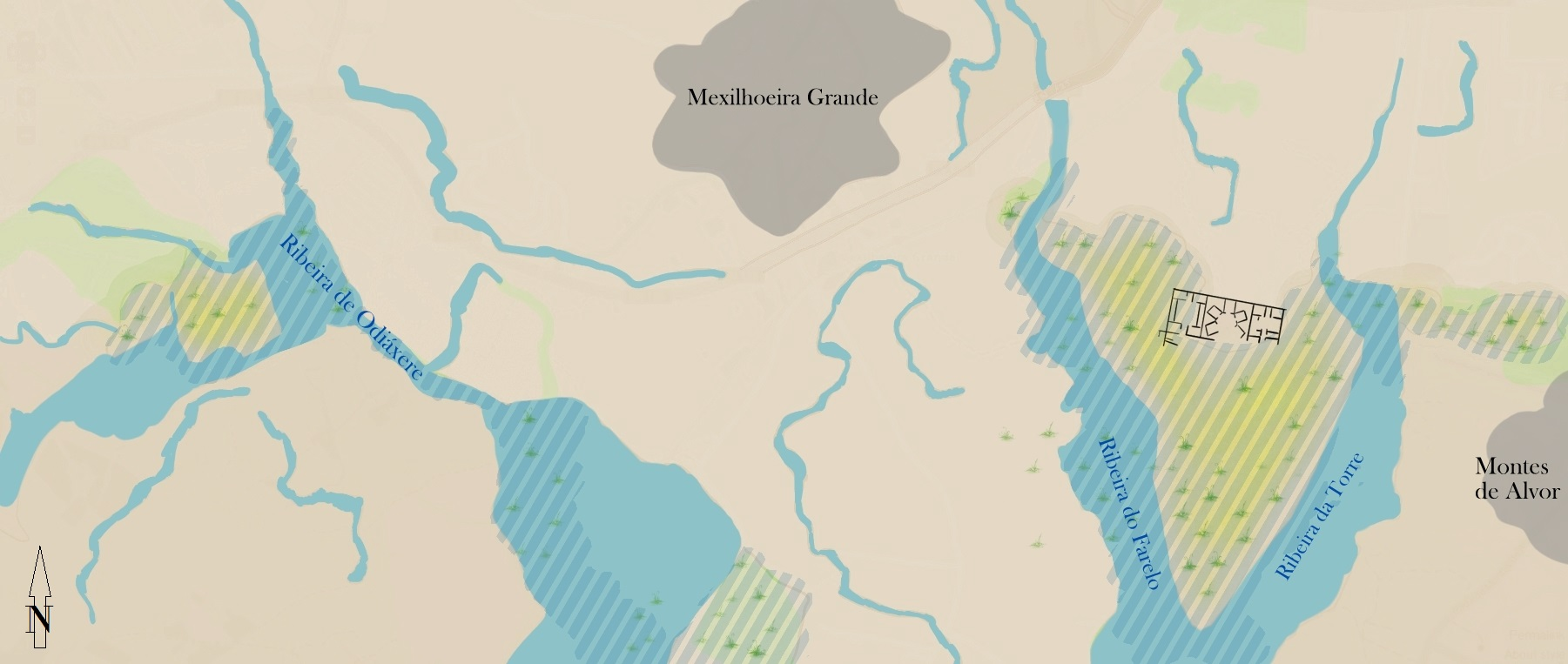 Runinen der Villa Abicada im Umfeld von Mexilhoeira Grande